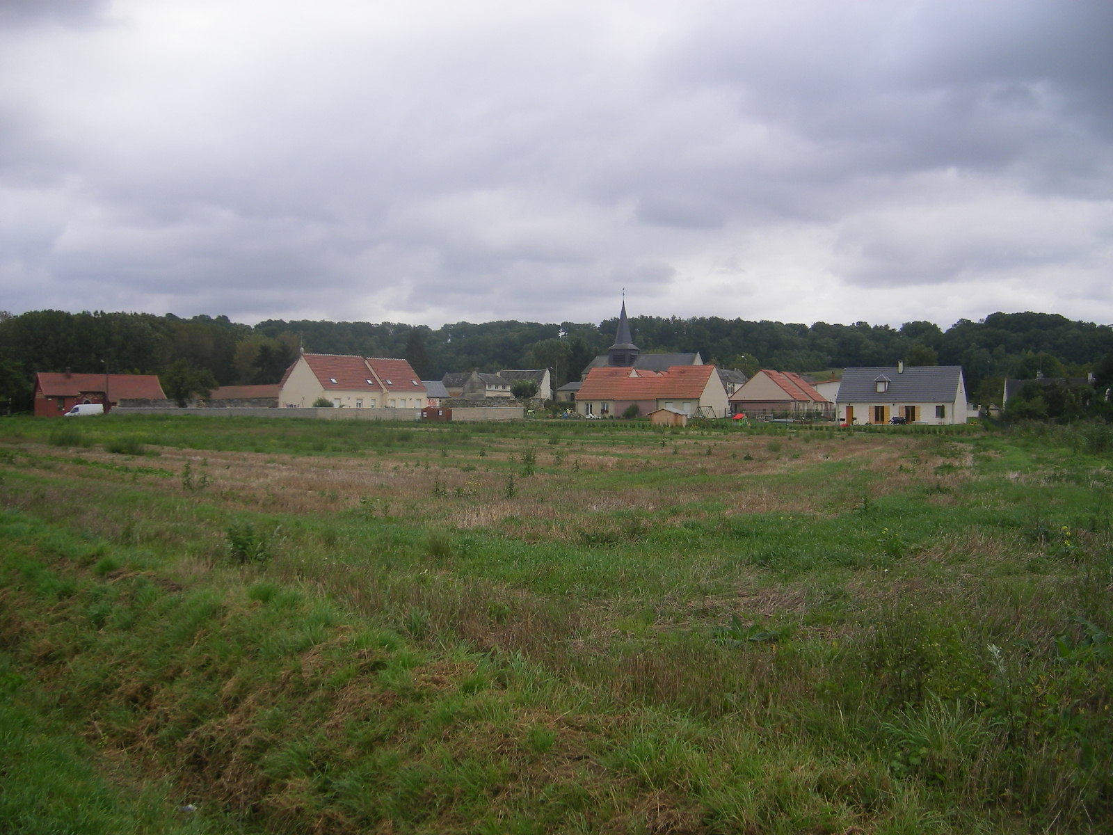 Saint-Aubin